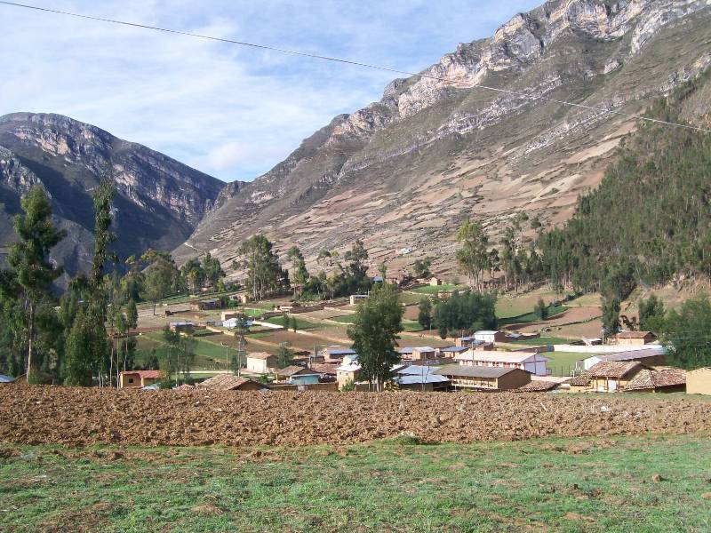 Es la foto actual de Distrito de San Juan de Rontoy